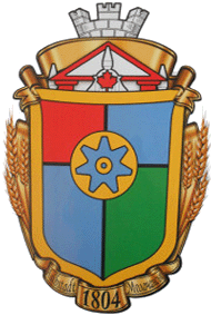 Герб Молочанська